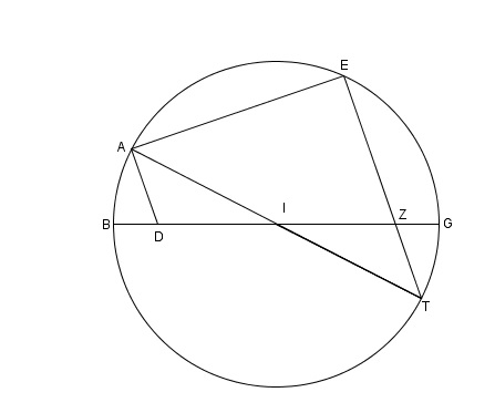 Il·lustració d'una de les proposiciones de les Data d'Euclides